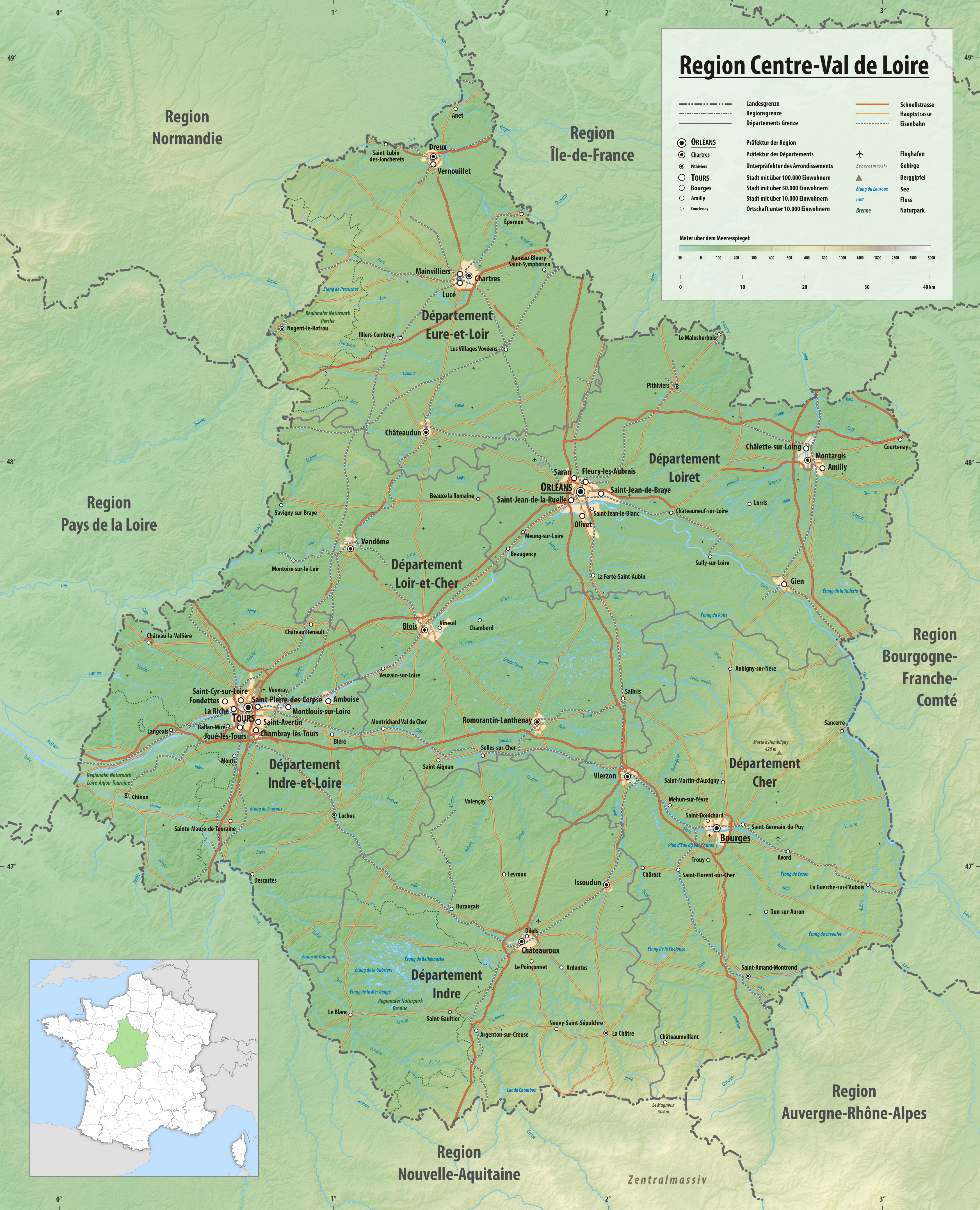 Reliefkarte der Region Centre-Val_de_Loire Topographischer Hintergrund: NASA Shuttle Radar Topography Mission (public domain). SRTM3 v.2.